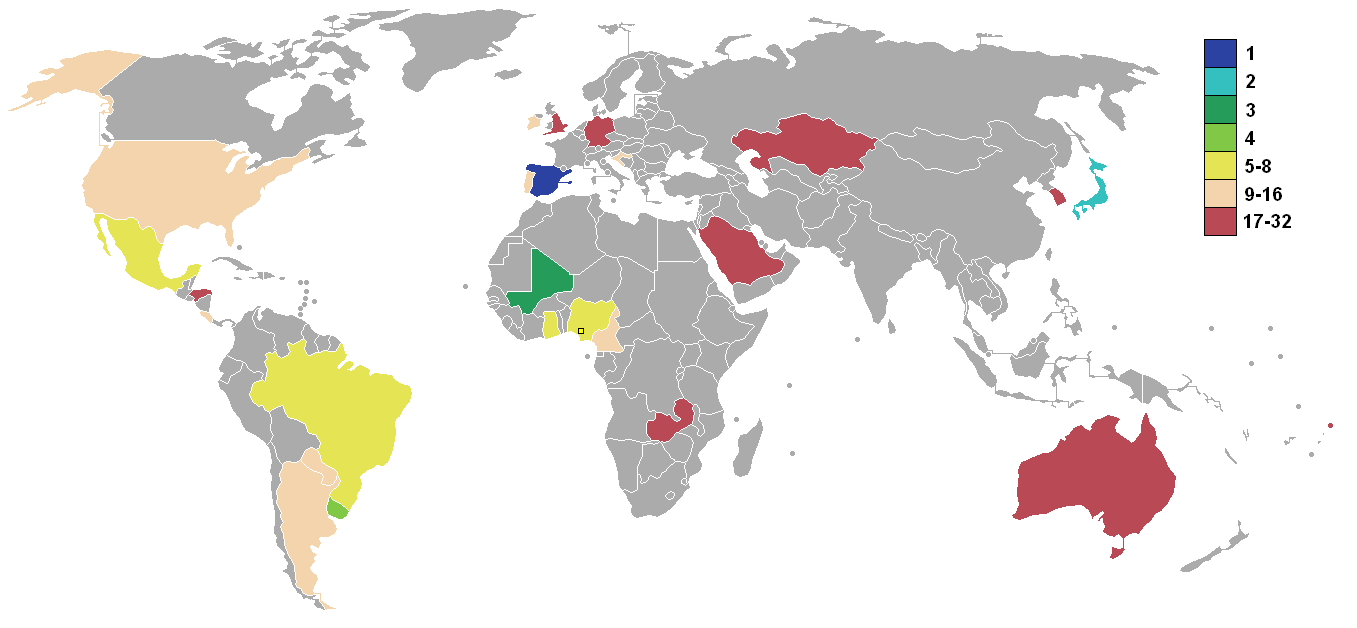 Copa disputada en Nigeria